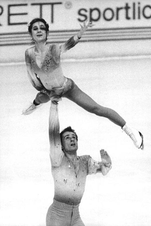 Birgit Lorenz, Knut Schubert ADN-ZB Thieme 20.11.81 Karl-Marx-Stadt: Die erste Entscheidung beim XXI. Internationalen Eiskunstlauf-Wettbewerb um den Pokal der Blauen Schwerter fiel am Abend des 19.11.81 im Paarlauf. Die Berliner Dynamo-Läufer Birgit Lorenz - Knut Schubert - hier bei einer einarmigen Hebefigur - erwiesen sich als die Besten. Abgebildete Personen: Schubert, Knut, Paar-Eiskunstläufer, Deutschland (DDR) Lorenz, Birgit, Paar-Eiskunstläufer, Deutschland (DDR)